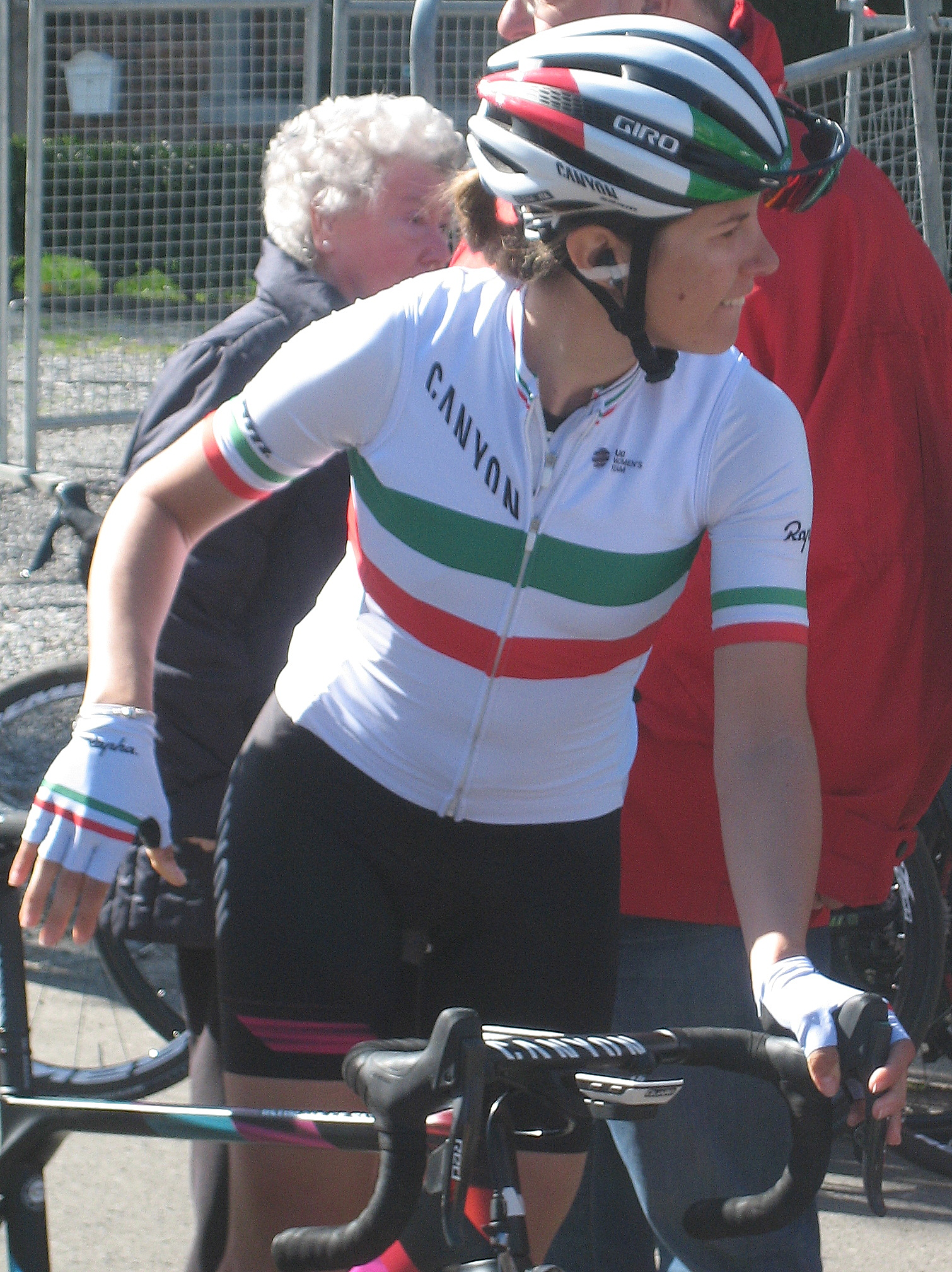 Elena Cecchini (Canyon-SRAM) voor start Waalse Pijl 2016